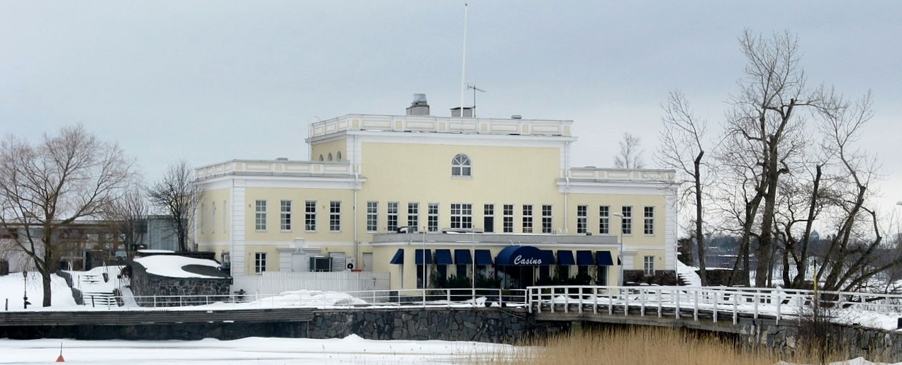 Kulosaaren Casino